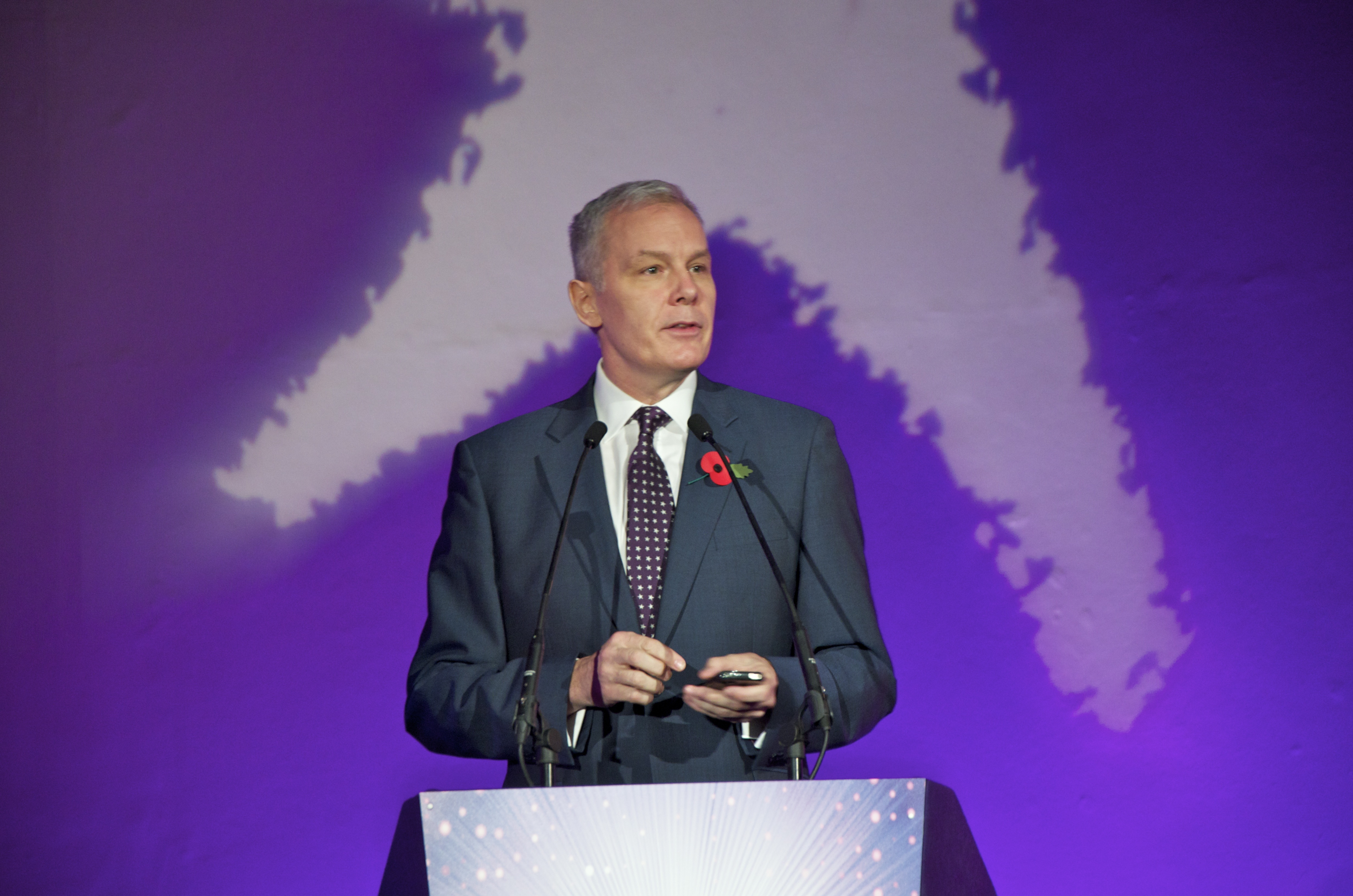 Ben Summerskill